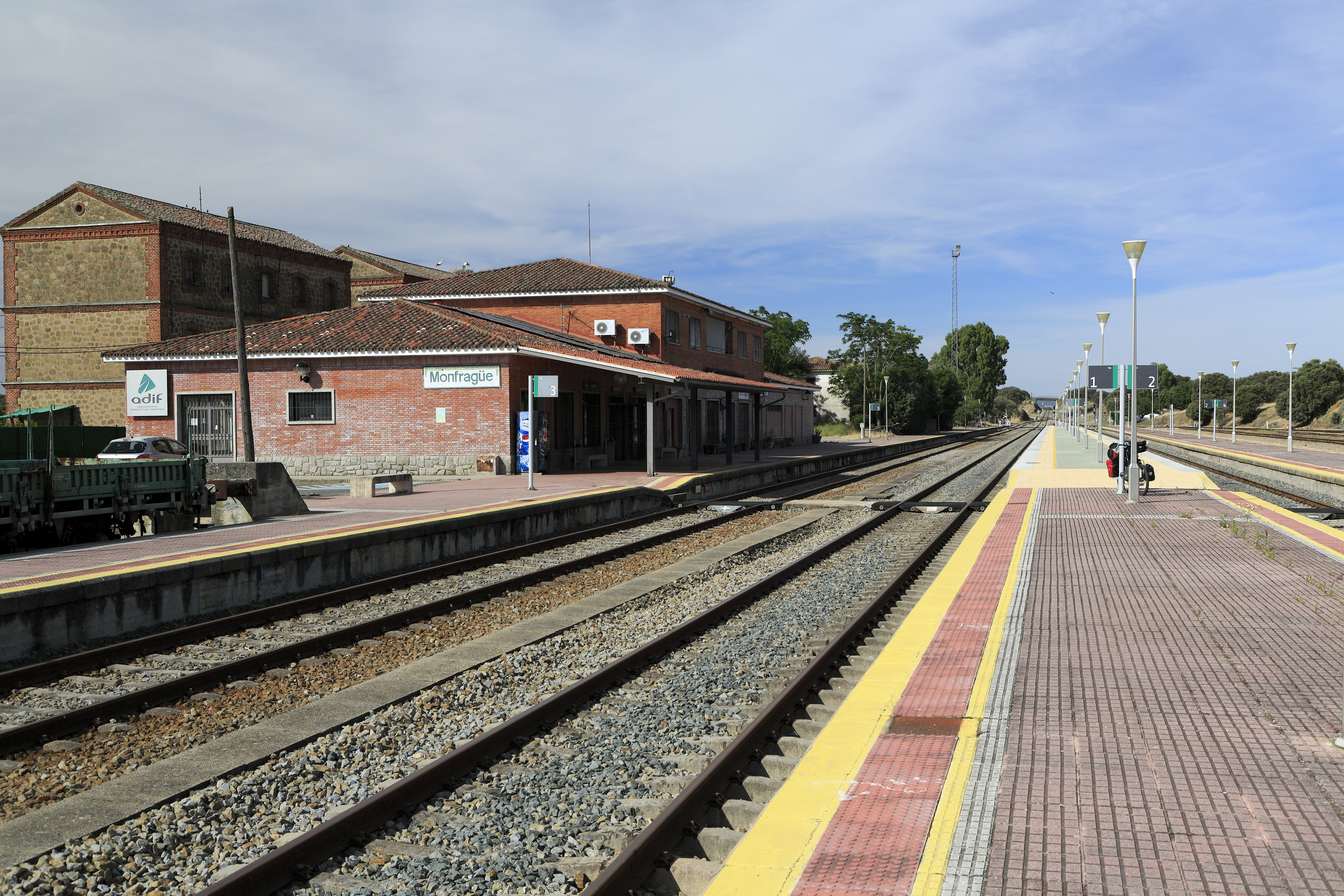 Empfangsgebäude mit Stellwerk, der Fahrdienstleiter arbeitet im vereinigten Dienst und verkauft gleichzeitig Fahrkarten. Beim relativ geringen Reisendenaufkommen auf diesem Bahnhof, der vor allem betriebliche Bedeutung hat, ist es vertretbar. Das elektronische Stellwerk ist für das gesamte Bogendreieck in Richtung Plasencia und Mirabel (–Cáceres) zuständig.Das Gleis 1 ist das Stammgleis der Strecke Madrid–Cáceres, das Gleis 2 rechts führt in Richtung Plasencia und bis 1984 weiter nach Salamanca.